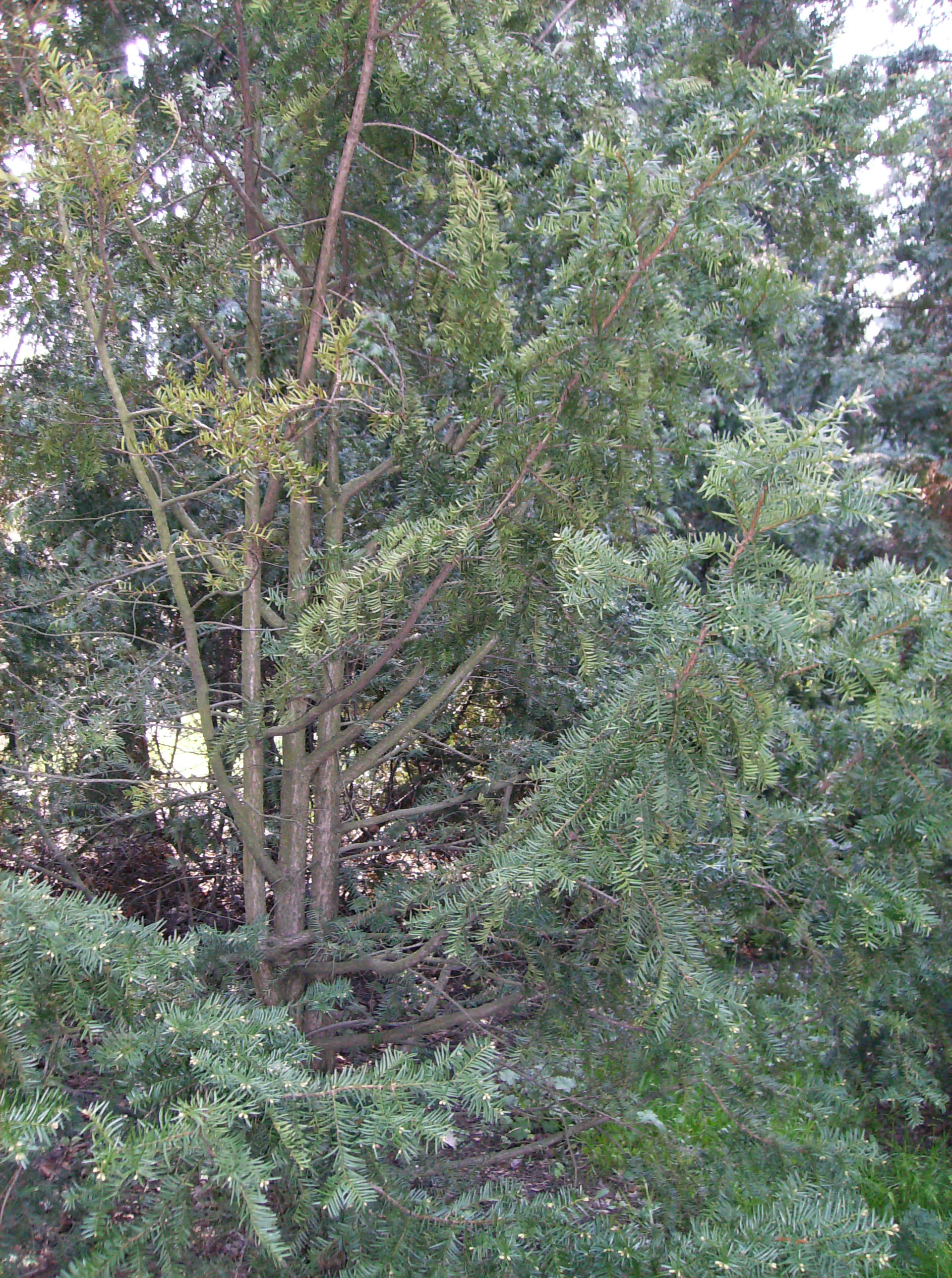 Taxus cuspidata